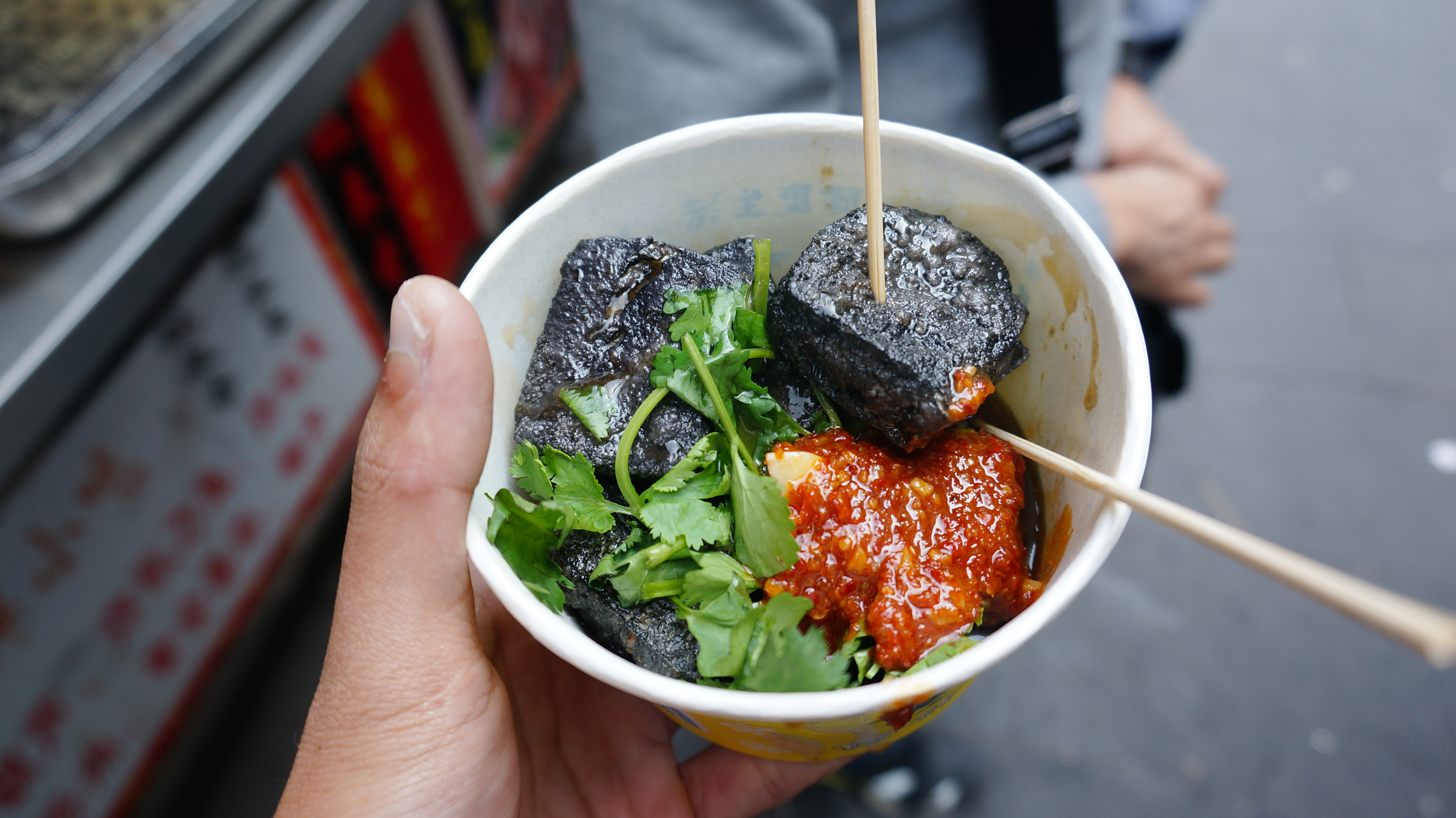 長沙臭豆腐 也許是商家功力不足，吃起來真的不怎樣。豆腐不臭不酥，醬汁口味尚能接受，但還是比不上臺灣的蒜汁。